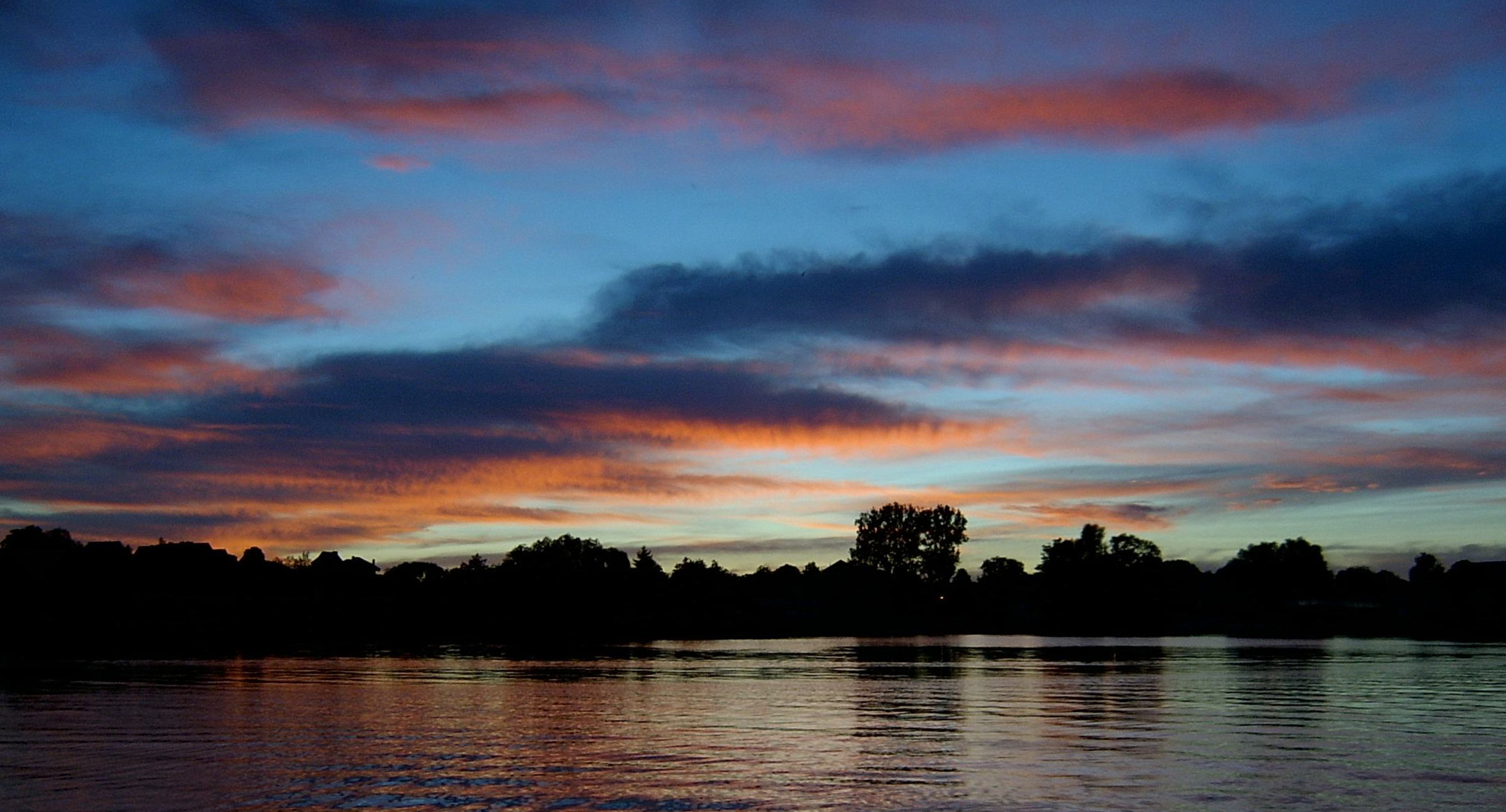 See in den Masuren bei Mikołajki in der Nacht photographer: Sicherlich Post date: september 2005